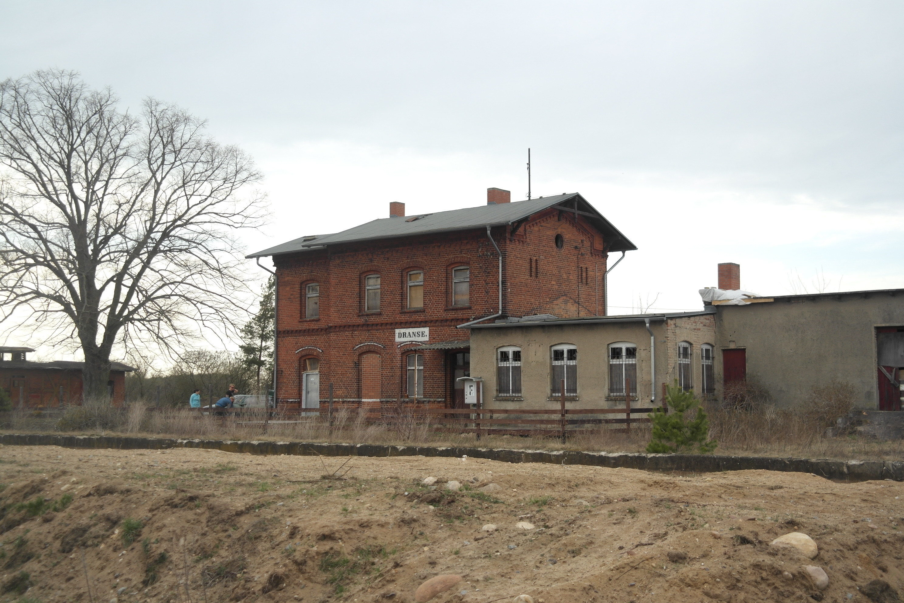 Bahnhof Dranse bei Wittstock, Baudenkmal